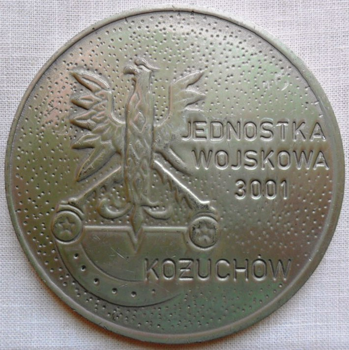 Medal pamiątkowy